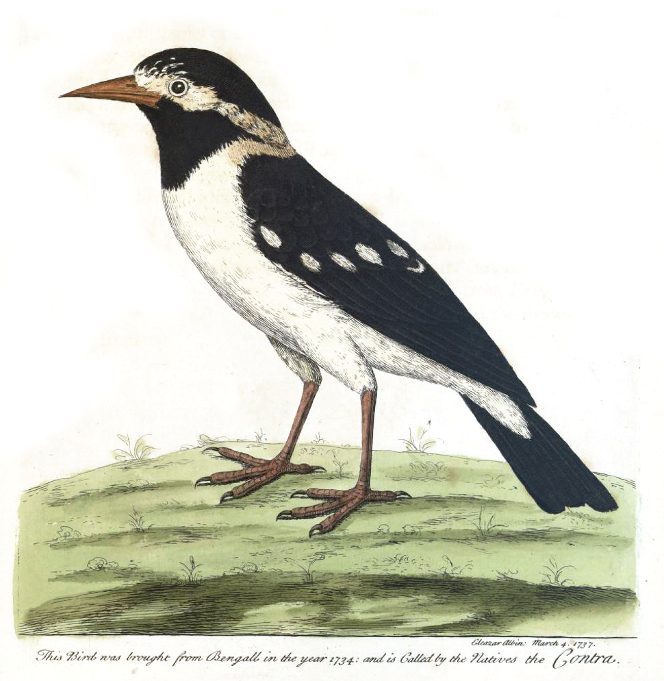 Sturnus / Gracupica contra by Eleazar Albin